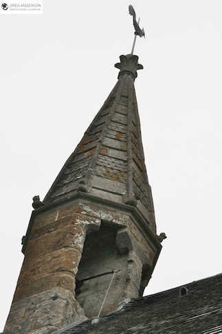 Clocher de la chapelle Saint-Clair (CLMH, 26/12/1930)